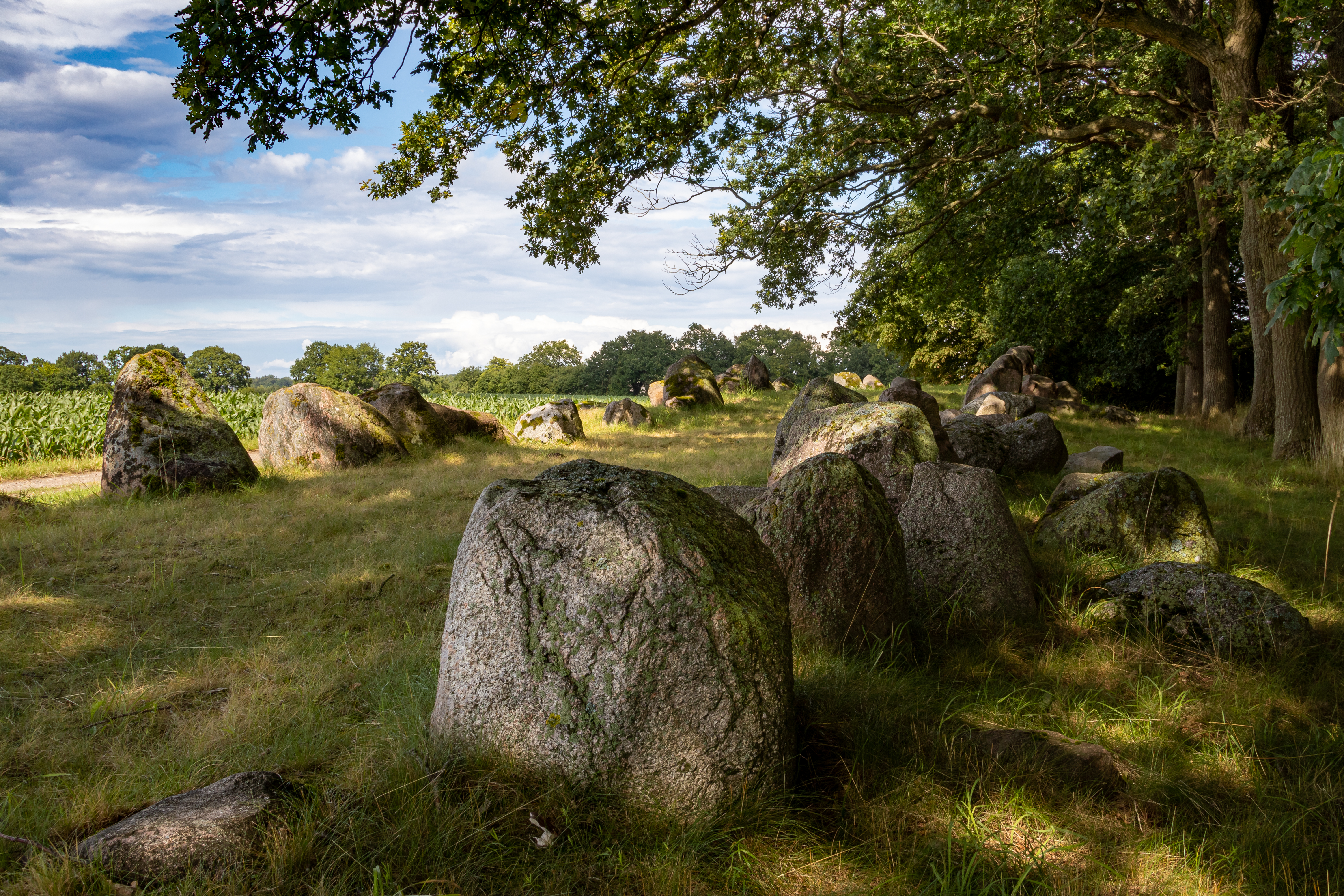 Großsteingrab Futterkamp 3, Blick von Westen